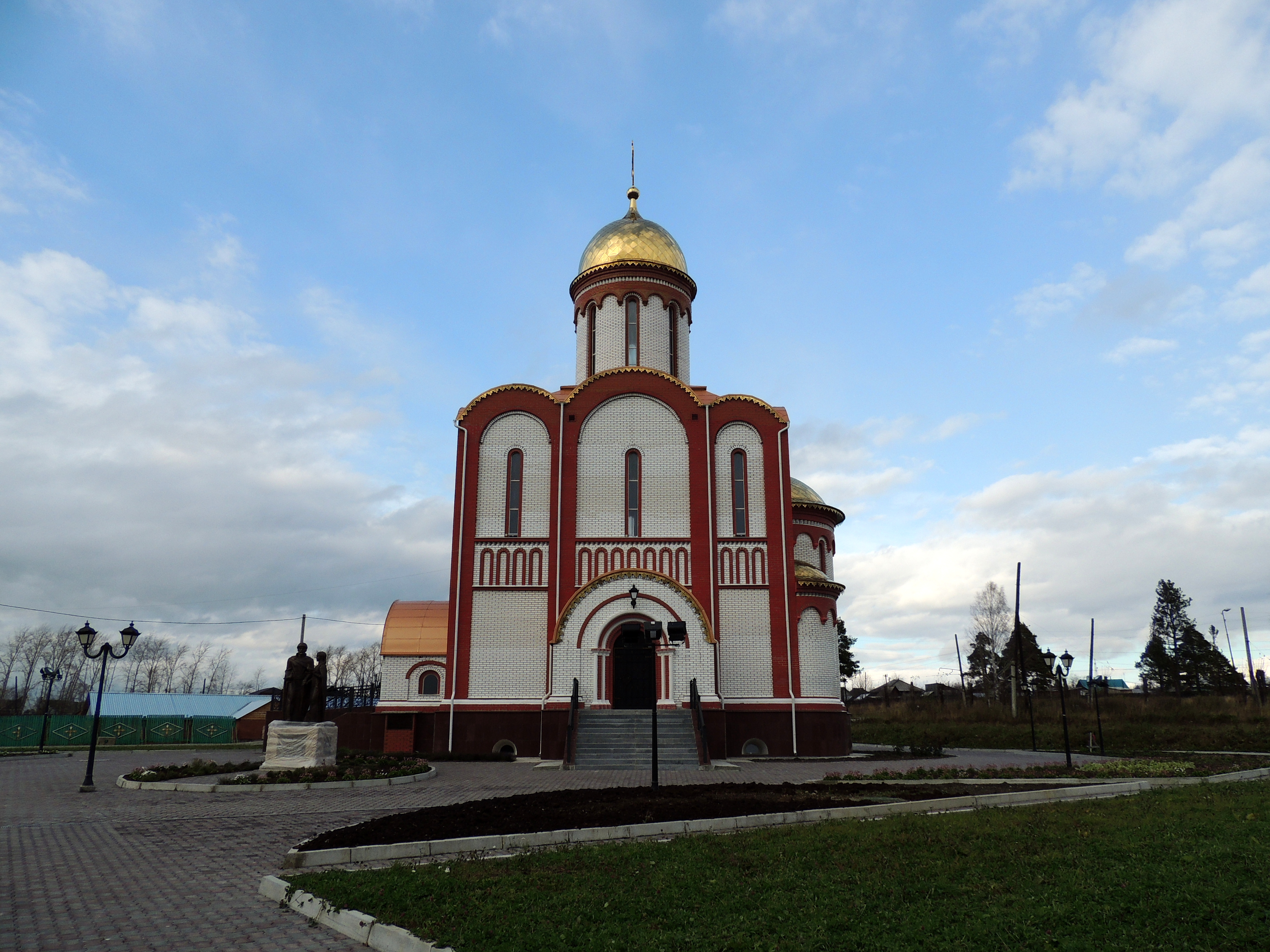 Храма во имя Святителя Николая Чудотворца